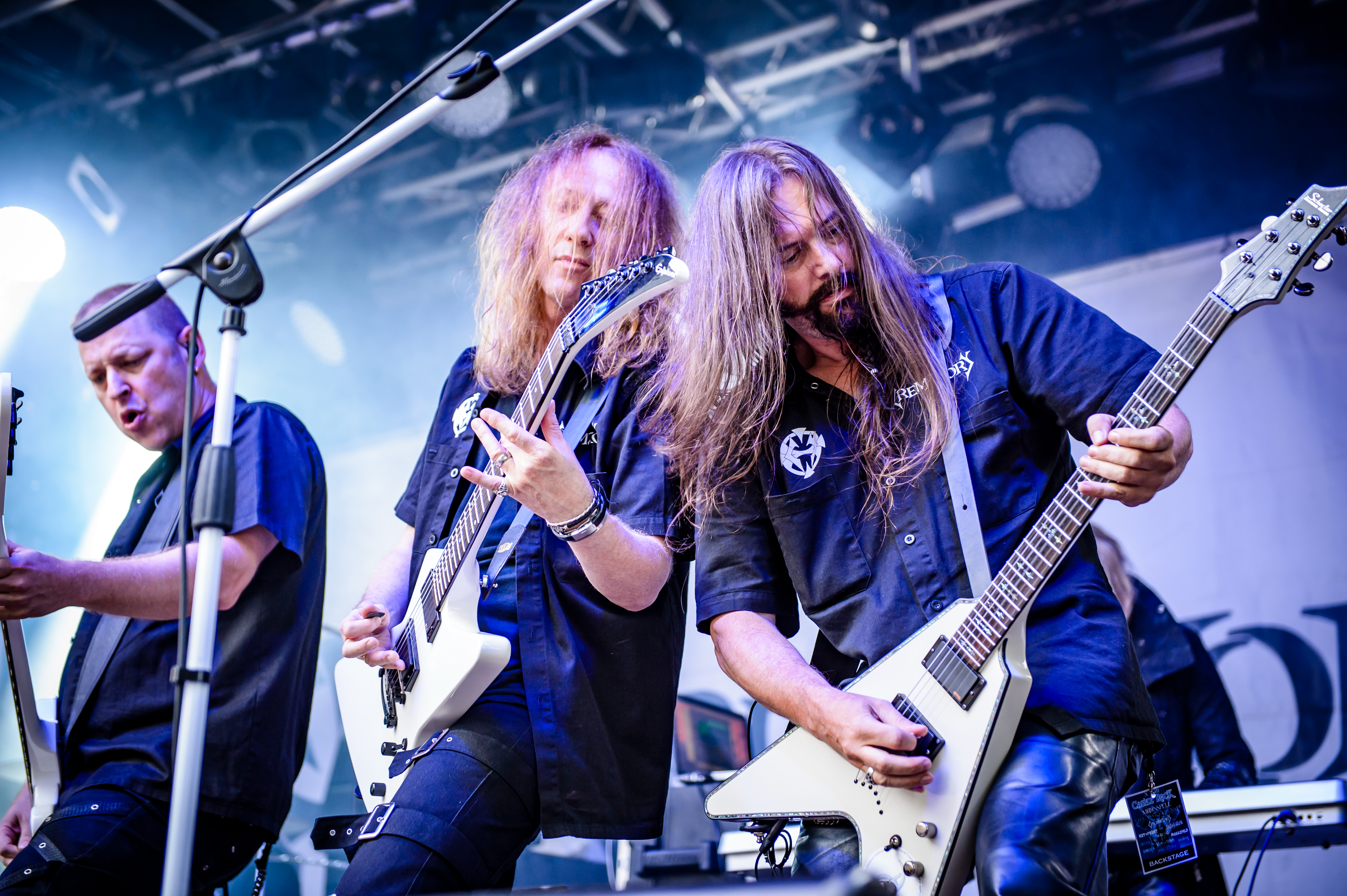 'Castle Rock 2017; Mülheim an der Ruhr': 'Crematory'